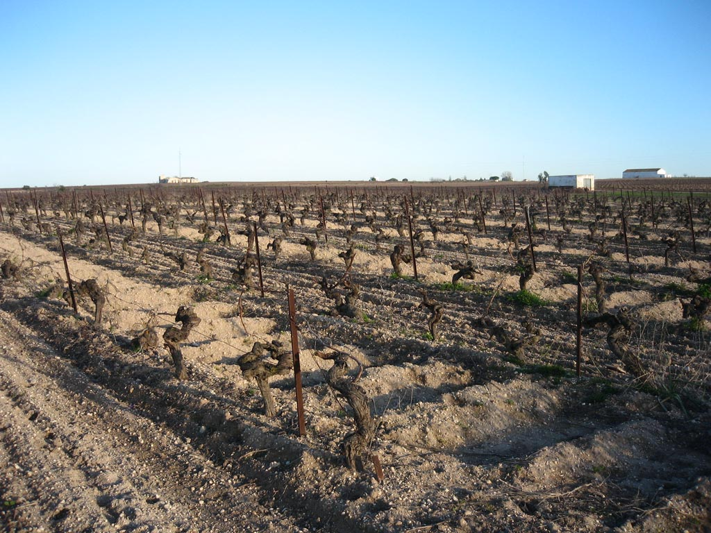 Viña alumbrada[11] en invierno.